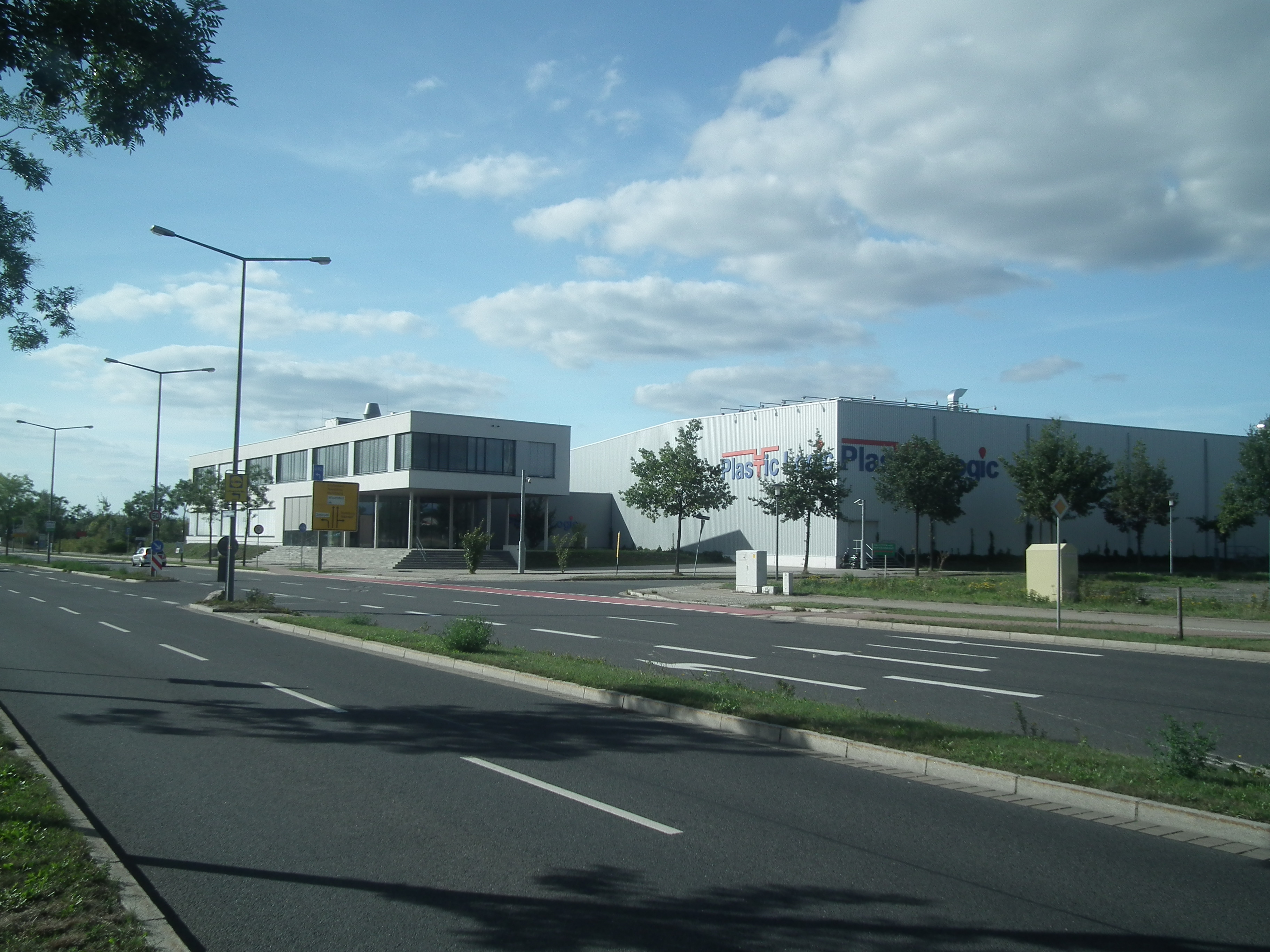 Plastic Logic Niederlassung Dresden, Gewerbegebiet Rähnitz (Airportpark)